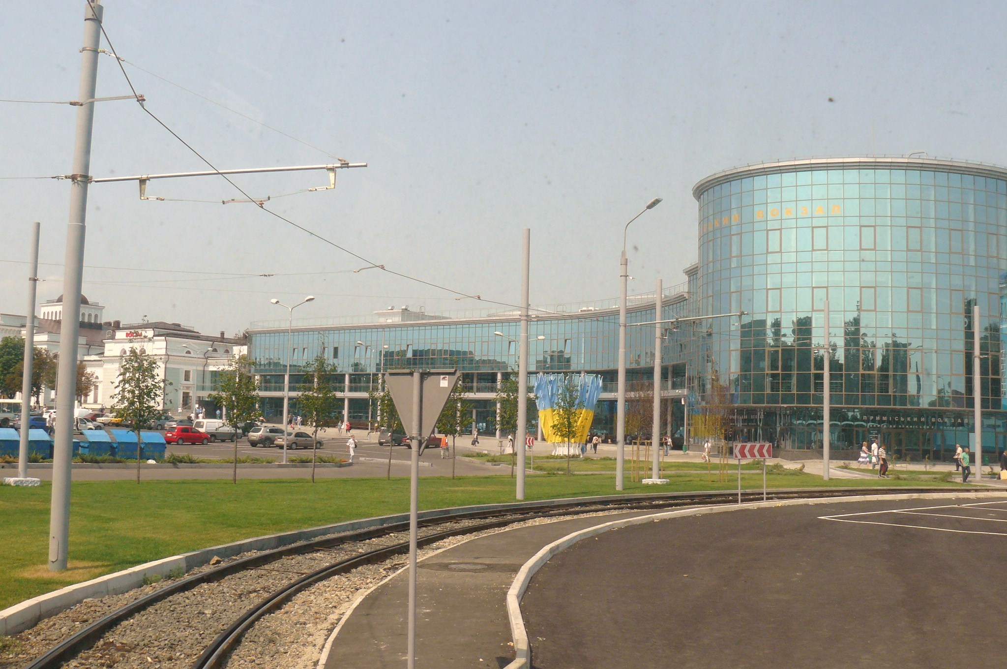 Donetsk, rail station.